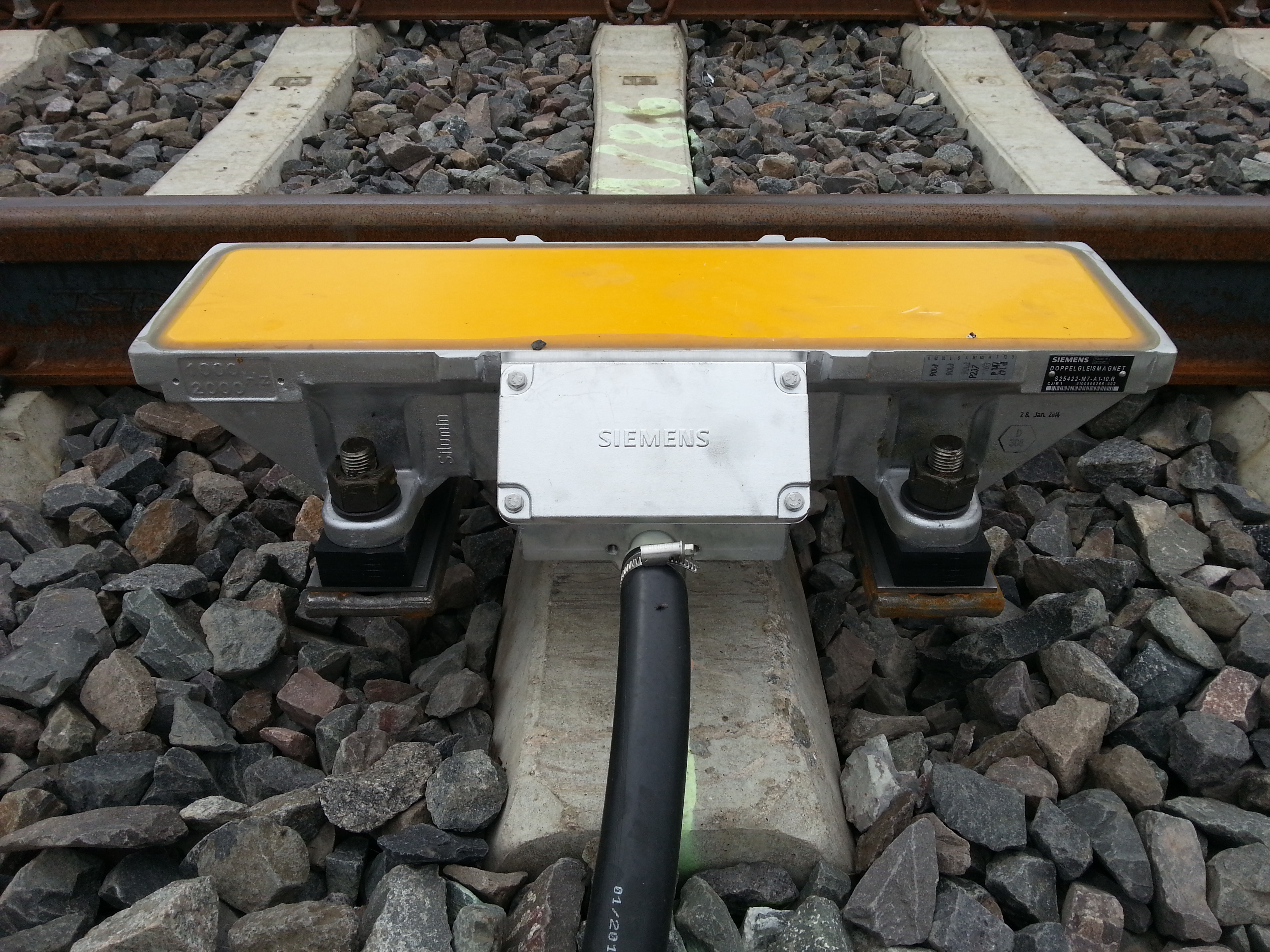 Siemens Doppelgleismagnet für 1000 und 2000 Hz für die punktförmige Zugbeeinflussung an der Bahnstrecke Stolberg–Herzogenrath zwischen Alsdorf Postraße und Eschweiler-Sankt Jöris.